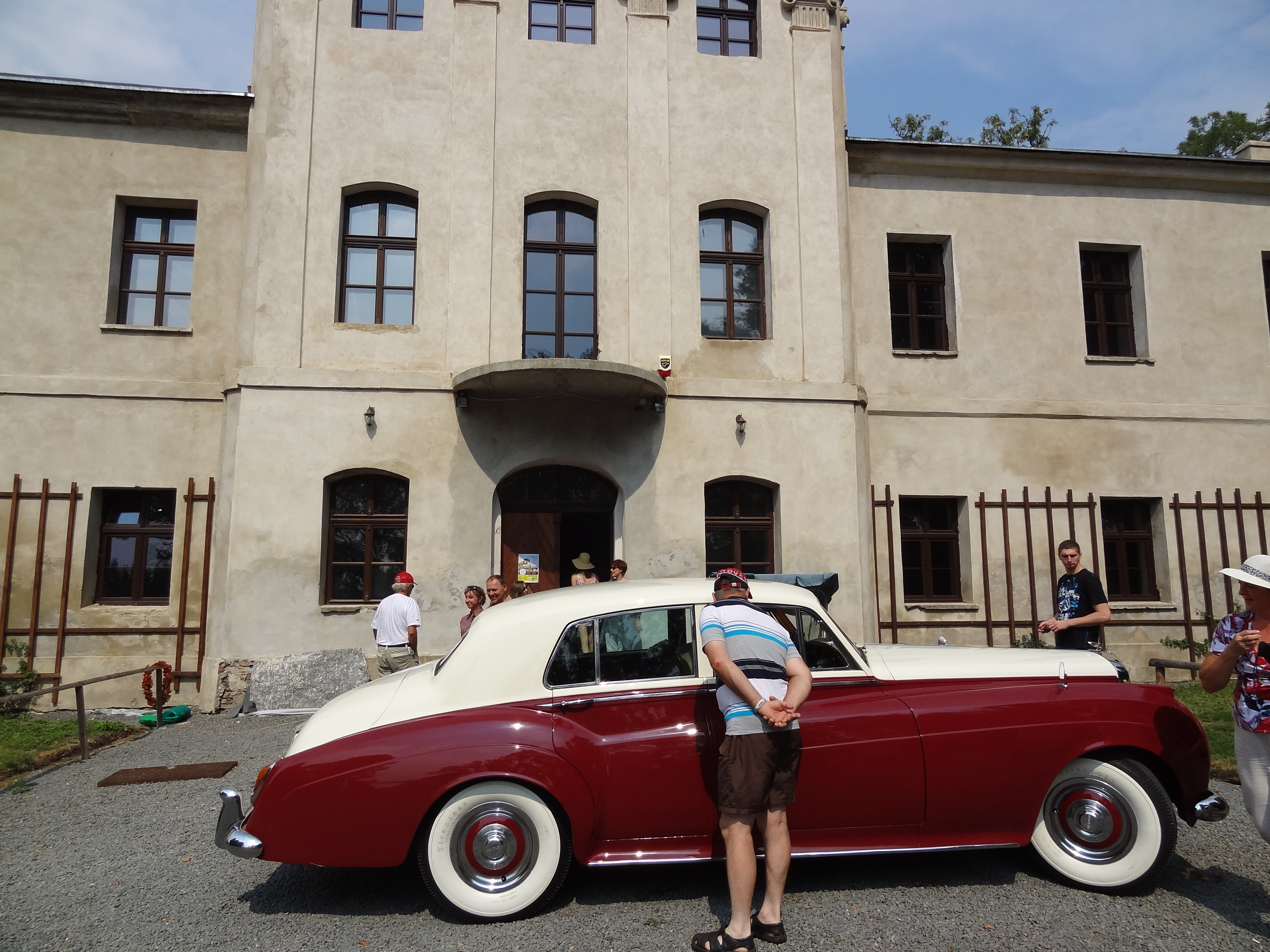 Rajd